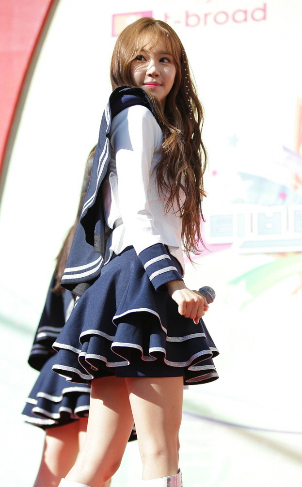 크레용팝(Crayon Pop) 도시 꼬마들의 행복한 축제 티브로드 원음방송